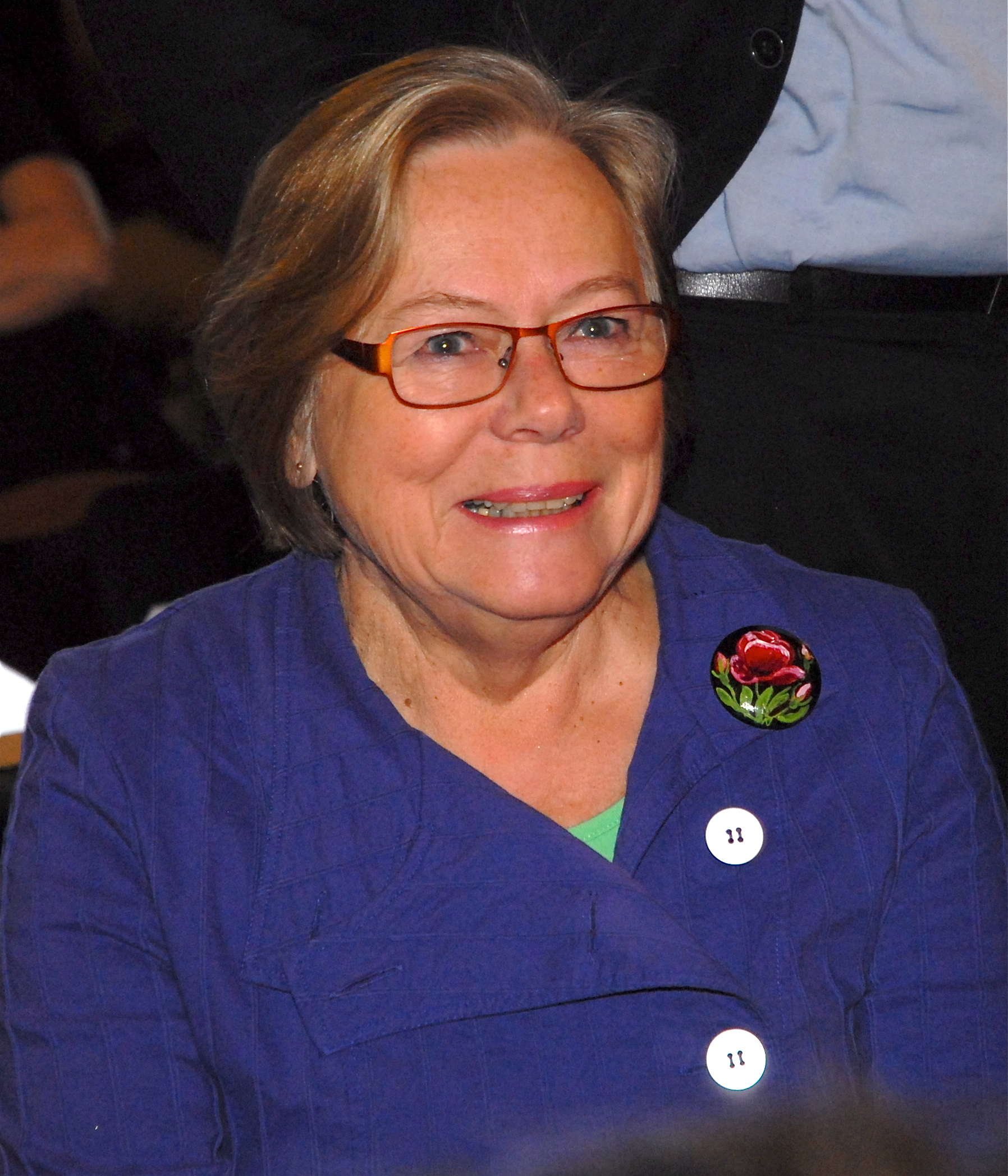 Anna-Greta Leijon på socialdemokraternas partistyrelse i Stockholm den 27 januari 2012 då Stefan Löfven väljs till partiordförande.